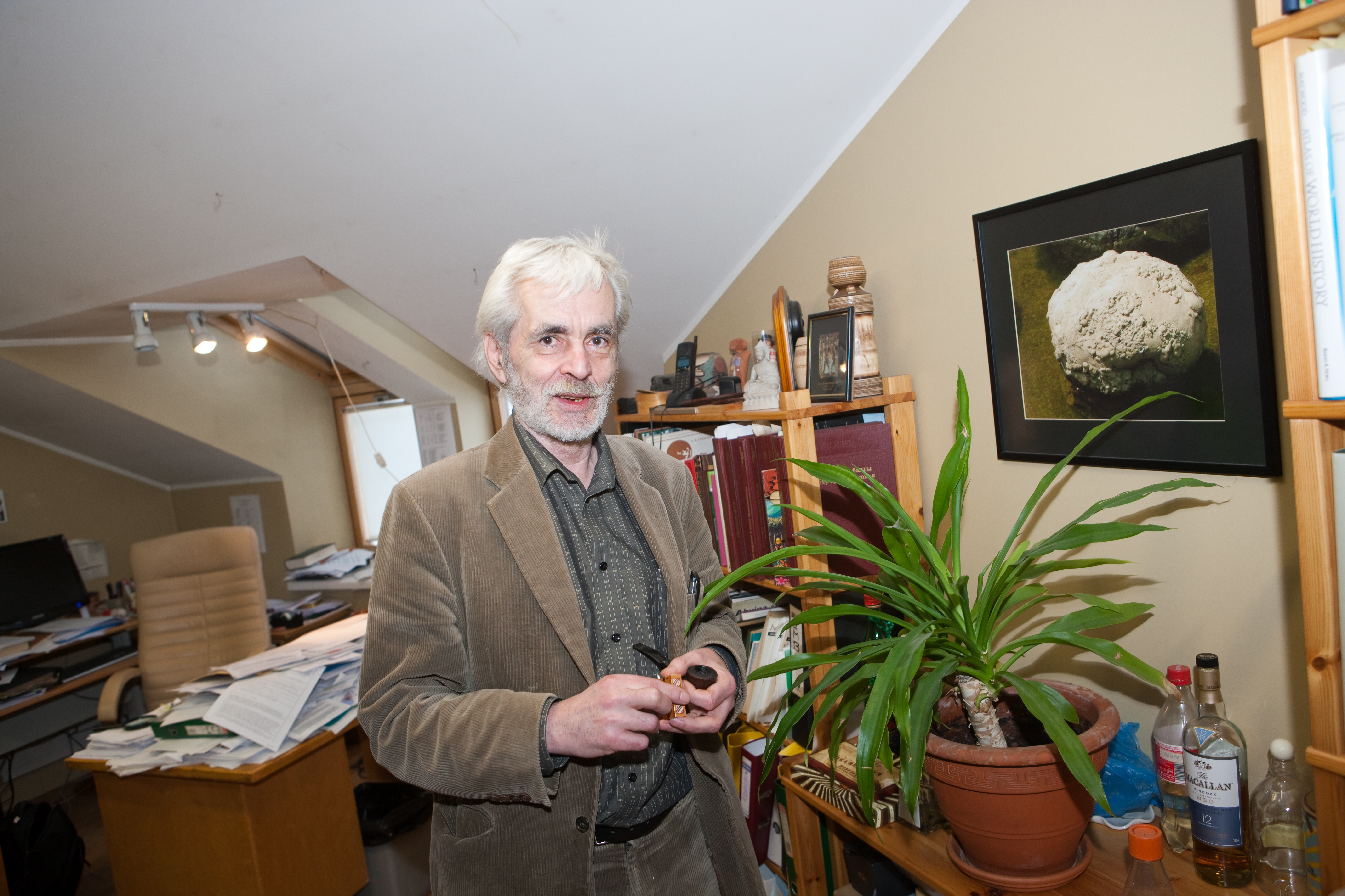 Teaduste Akadeemia president, akadeemik, Tartu Ülikooli molekulaar- ja rakubioloogia instituudi evolutsioonilise bioloogia õppetooli arheogeneetika erakorraline professor Richard Villems.